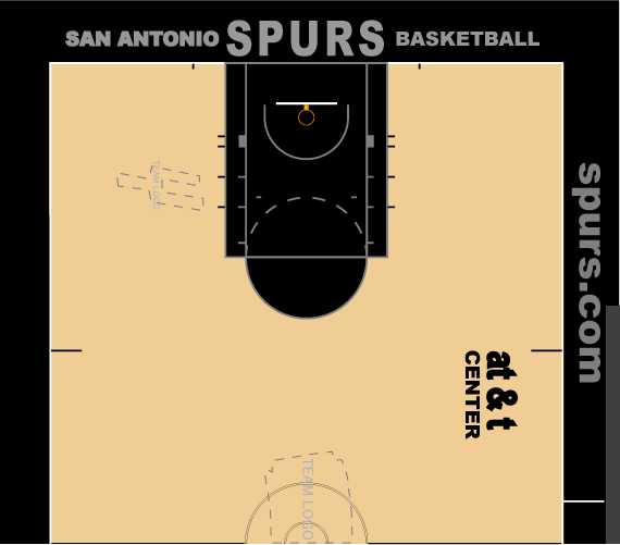 SPURS HOME COURT COLORING